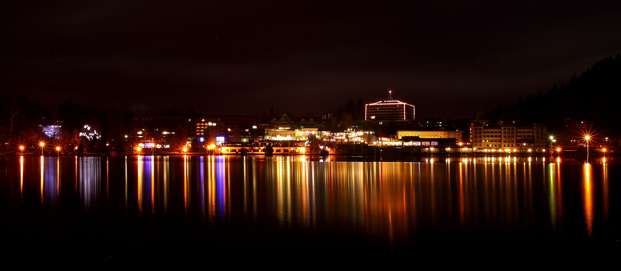 Bled ponoči, odsev luči na jezeru.